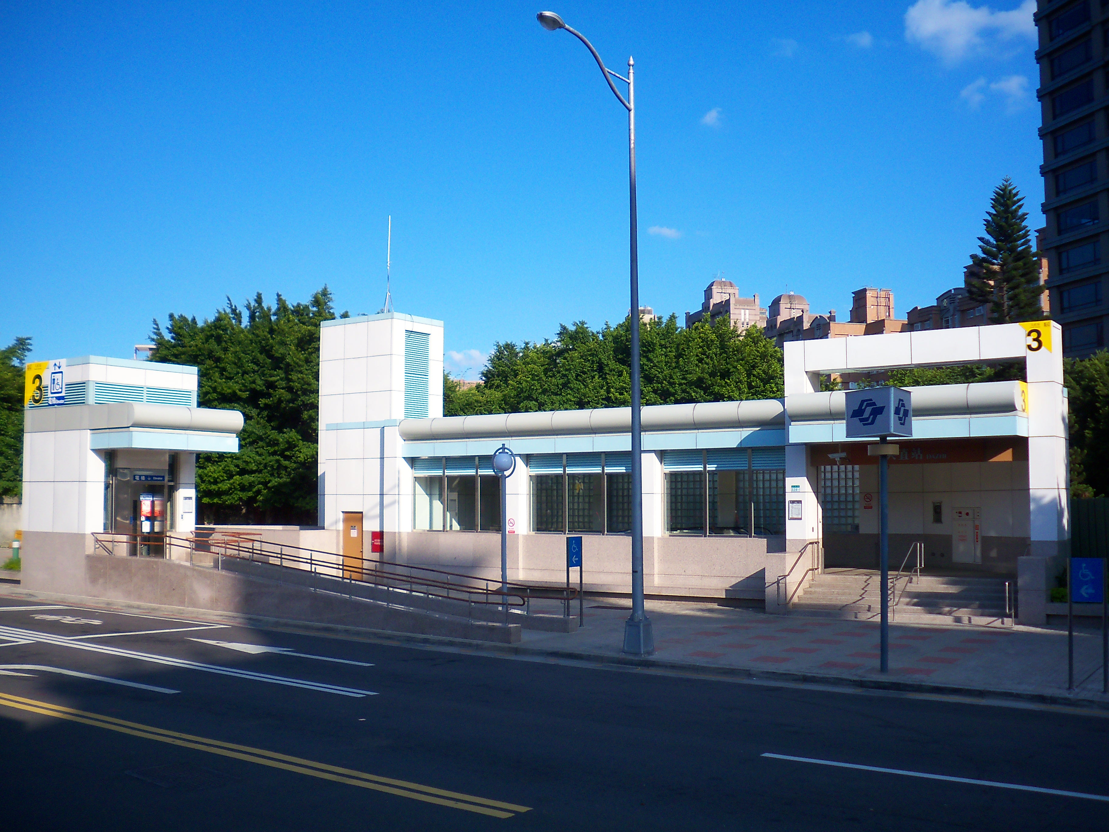 台北捷運内湖線大直駅3号出口。